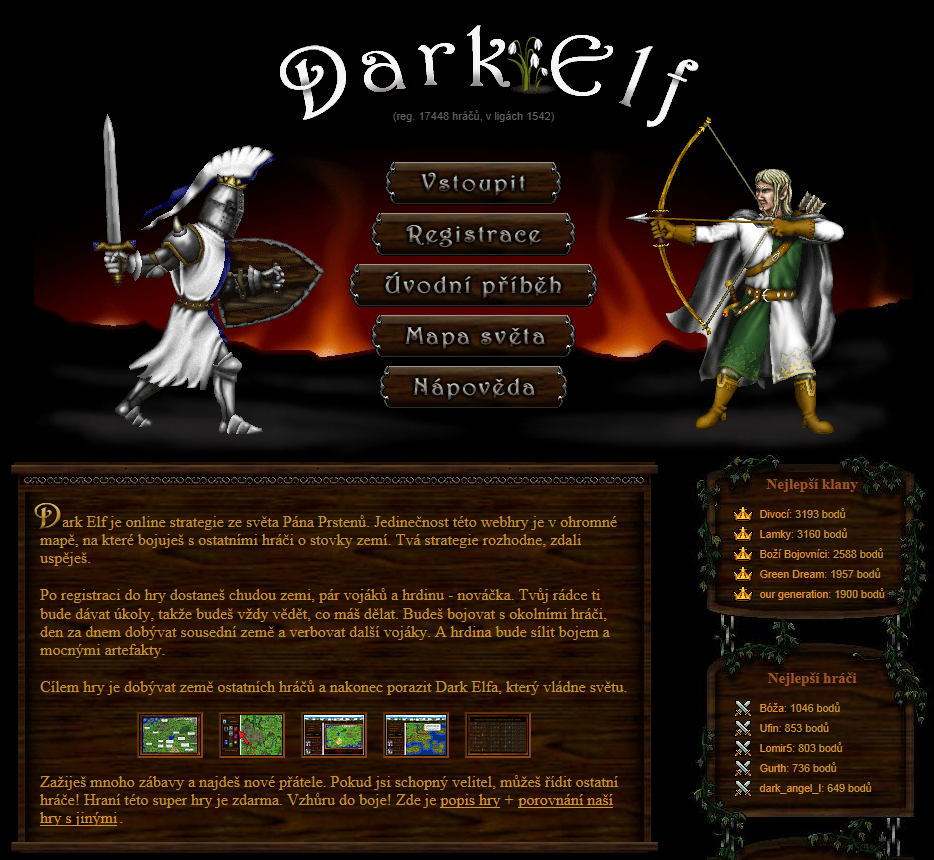 Darkelf - titulní stránka